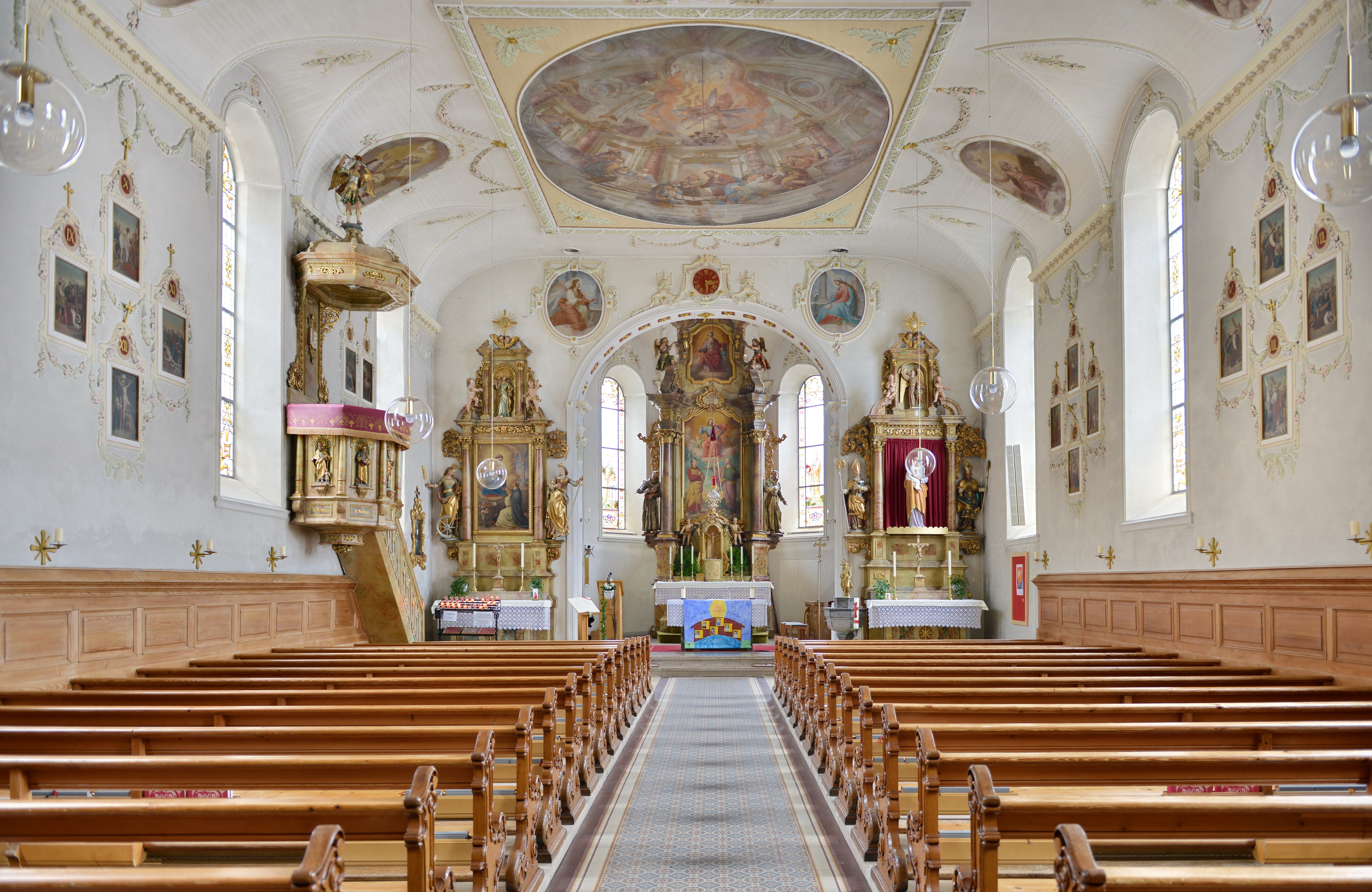 Pfarrkirche hl. Wolfgang, von Schnepfau.